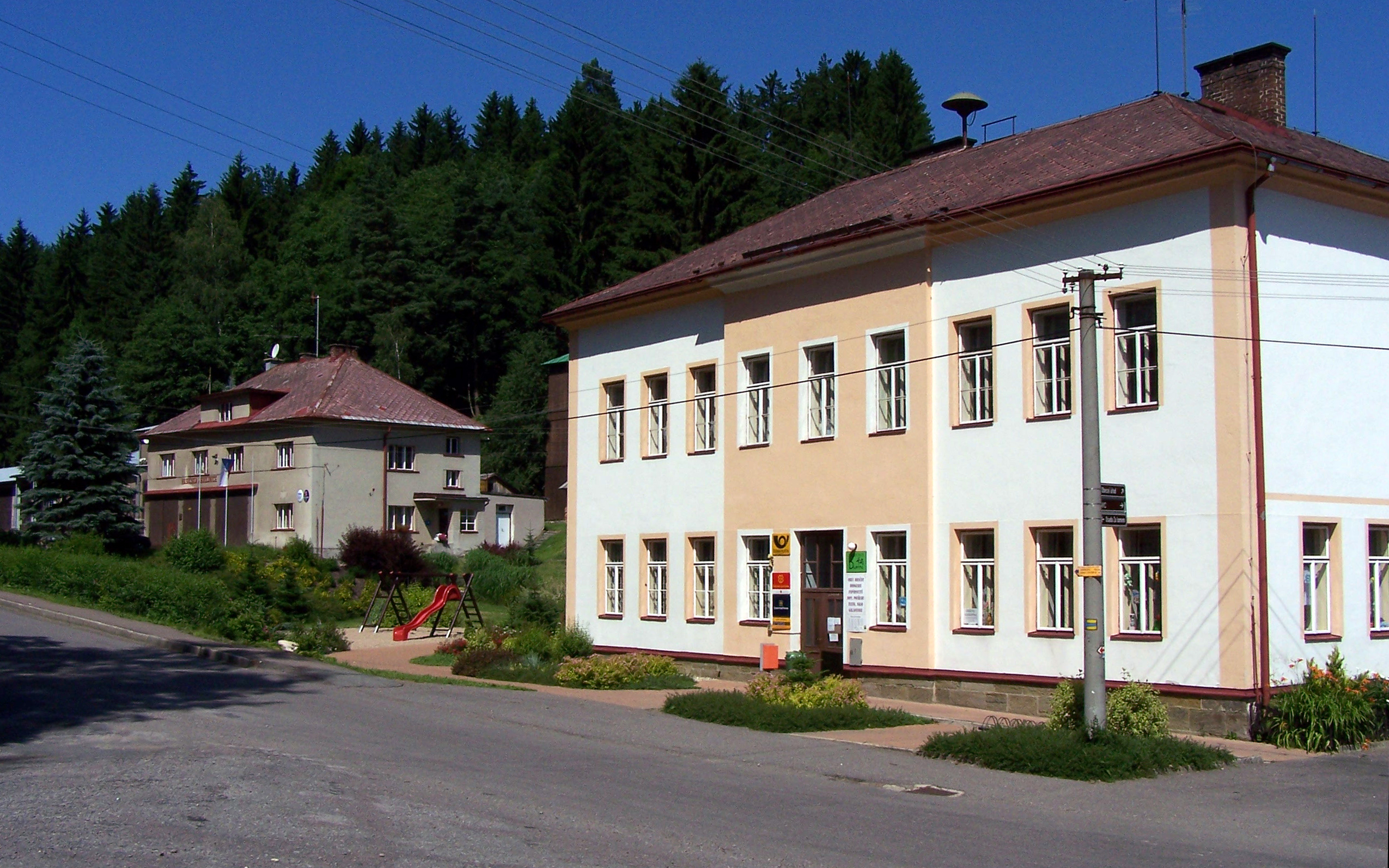 Klášterec nad Orlicí, vlevo Obecní úřad, vpravo Česká pošta.